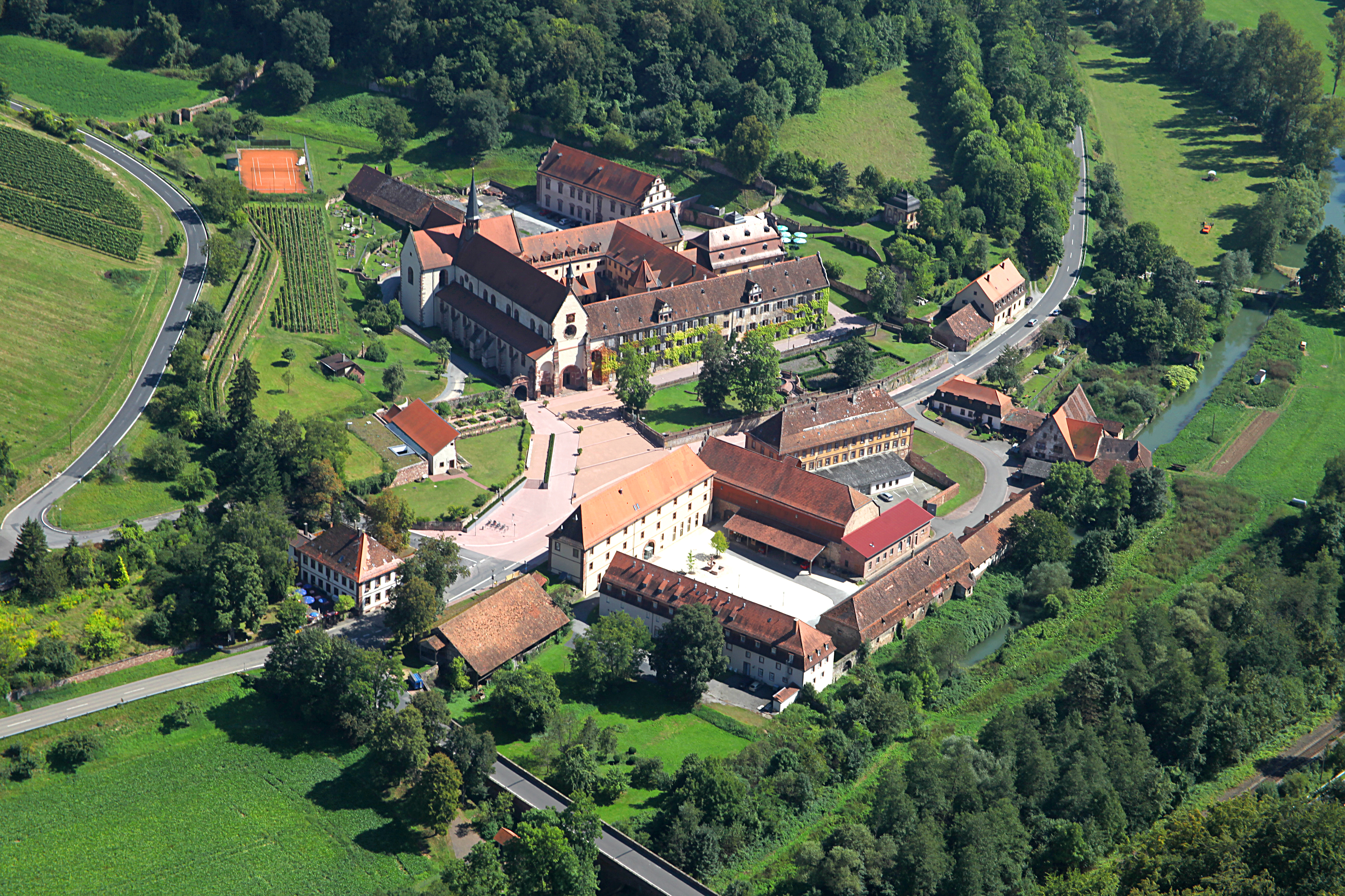 Kloster Bronnbach im Taubertal